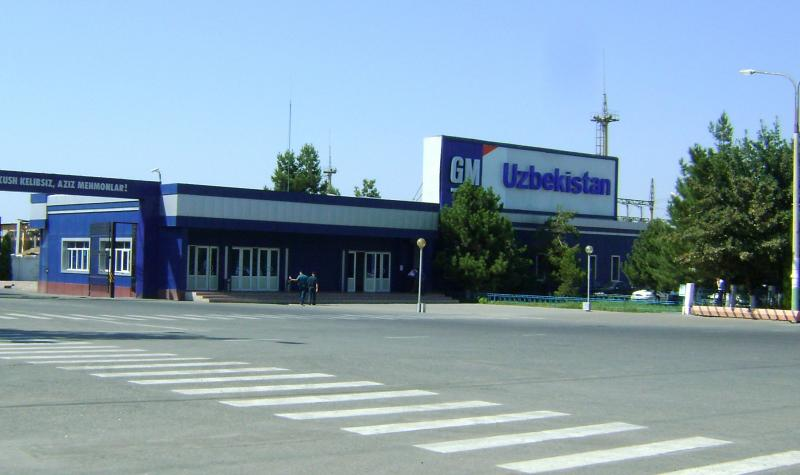 Asaka GM-Uzbekistan zavodi